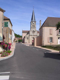 le bourg de Gibles